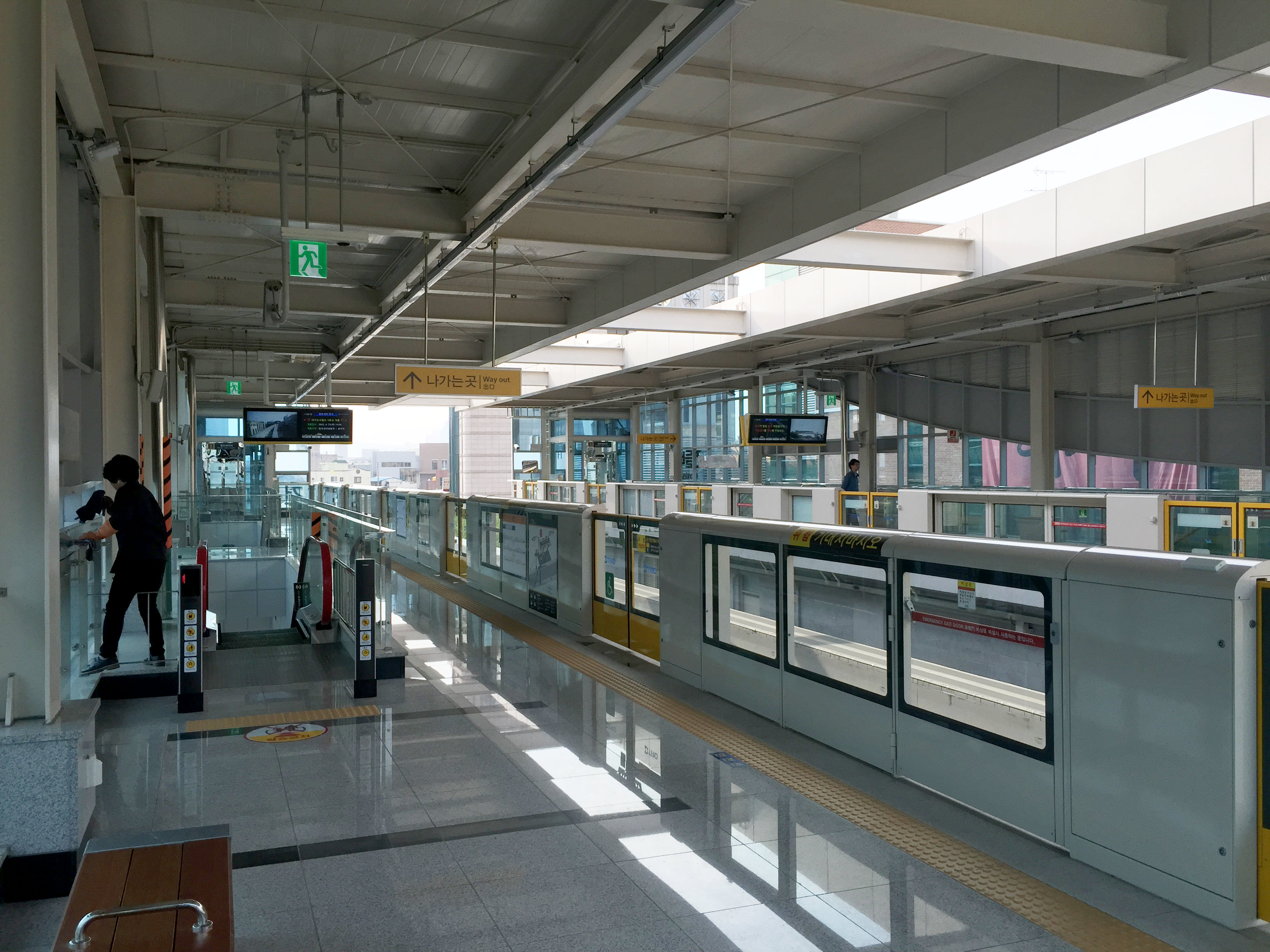 건들바위역 승강장